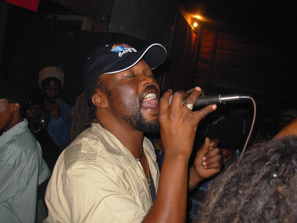 Vido Jelashe in Cape Town